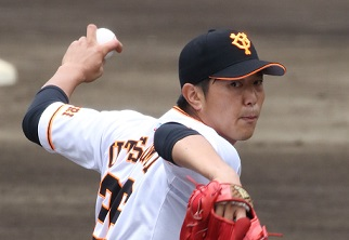 Giants ustumi26